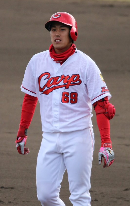 2017/11/20由宇練習場にて